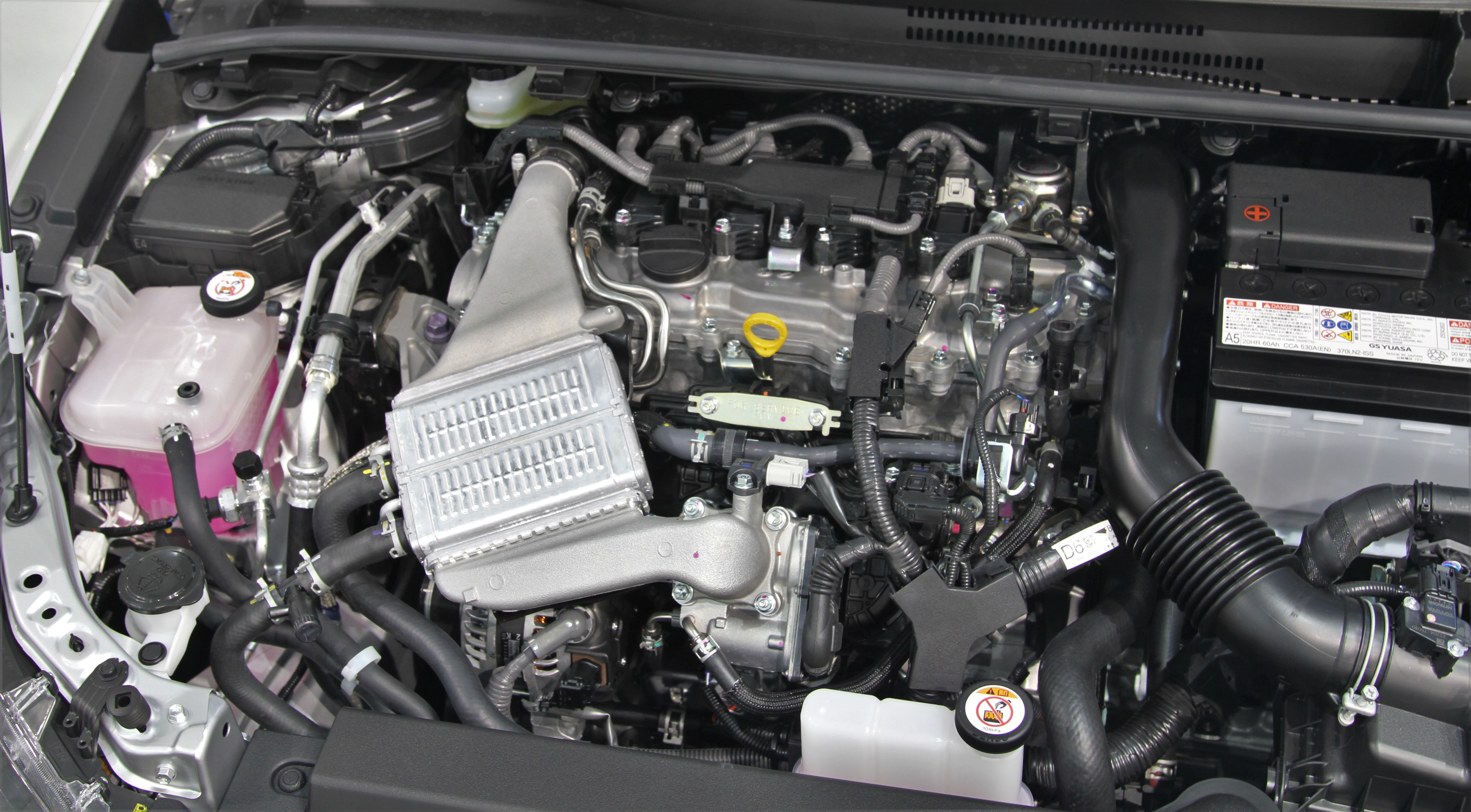 Toyota Corolla Sport